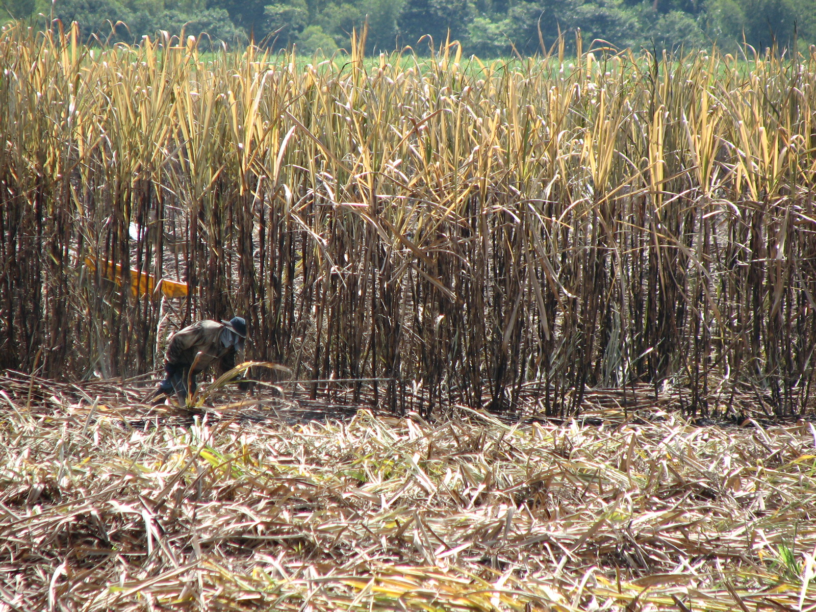 Cultivo Canna de Azucar, Valle del Cauca, Colombia